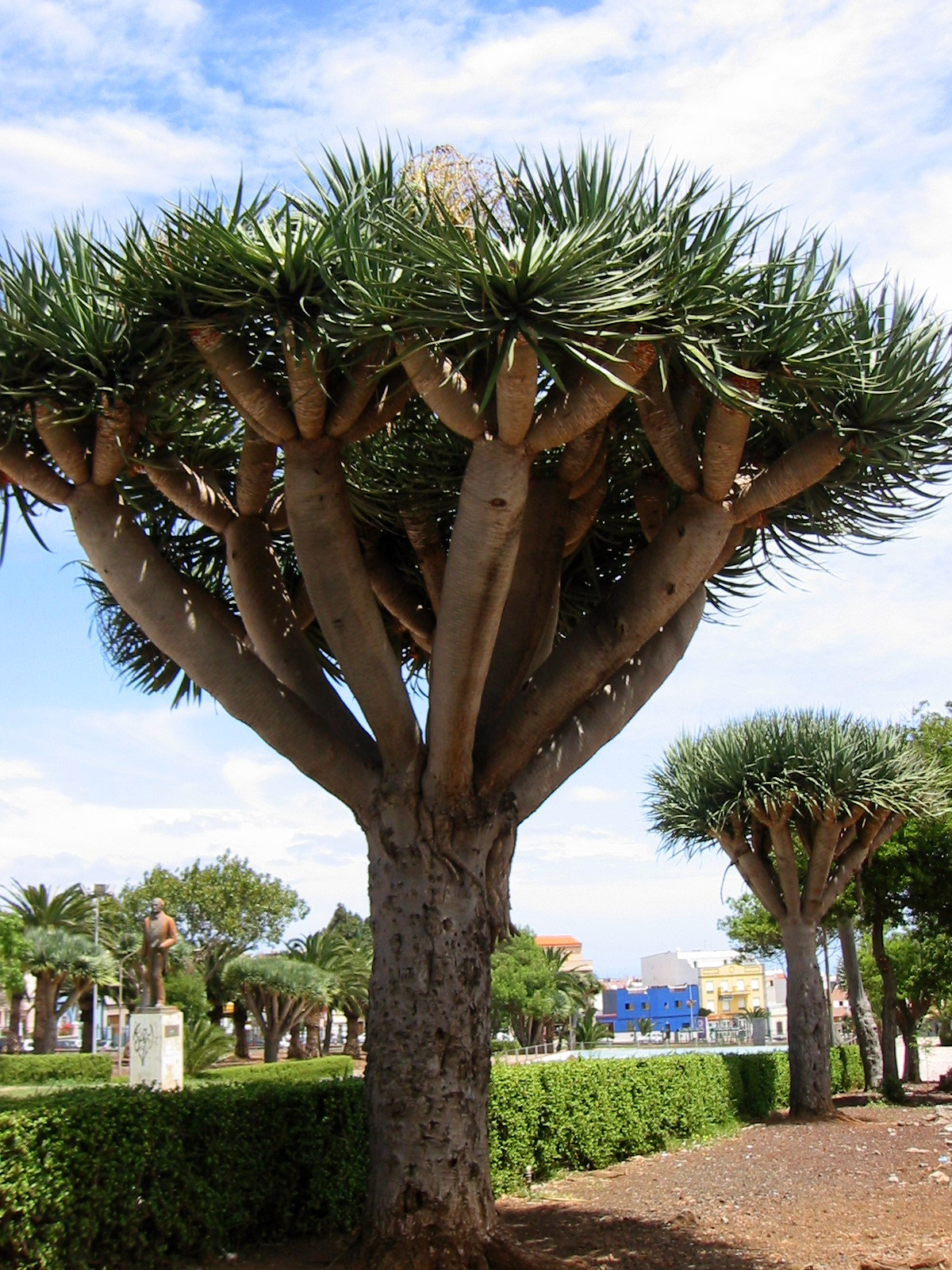 Dragos en La Laguna